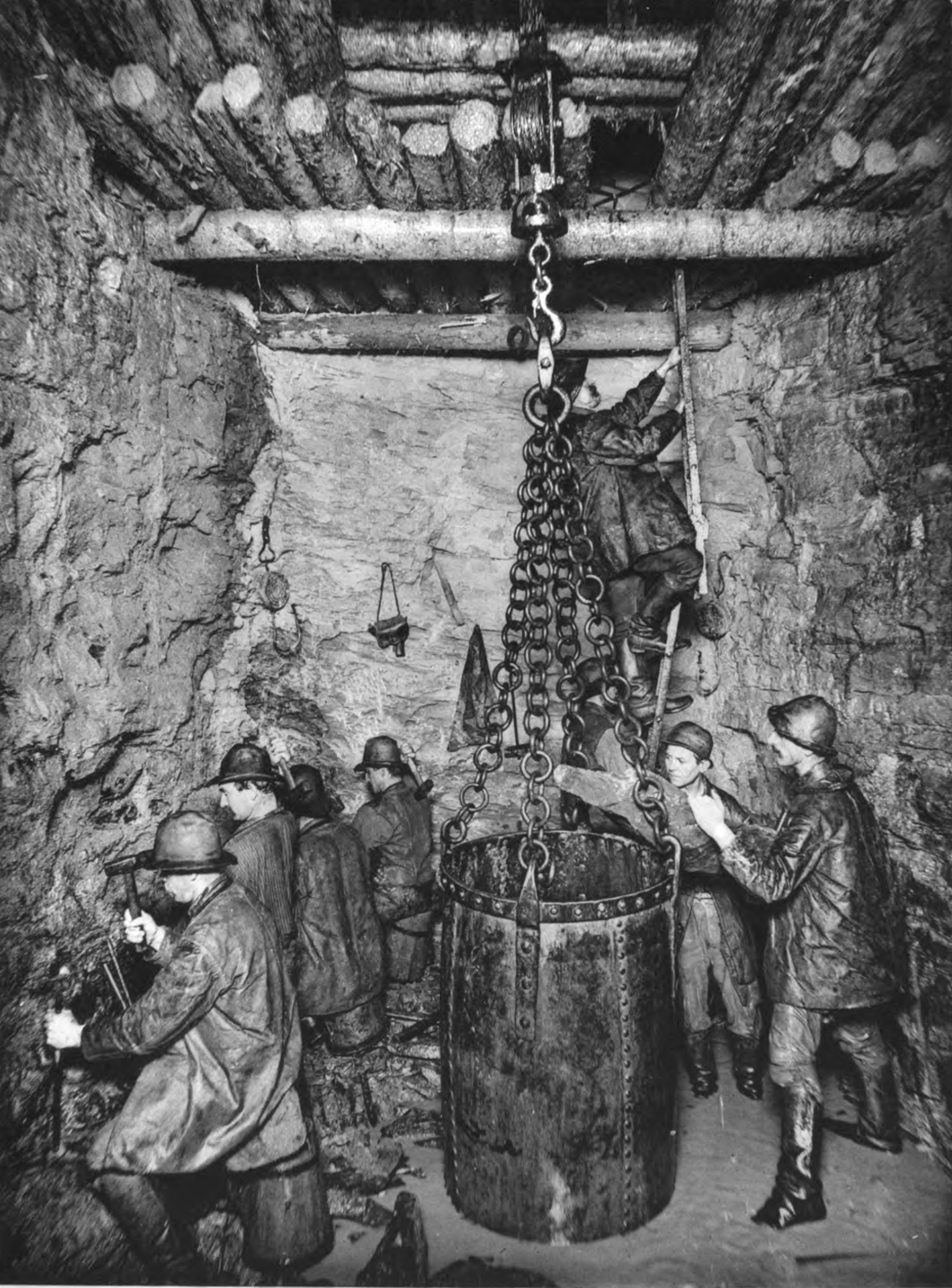 Schachtabteufen